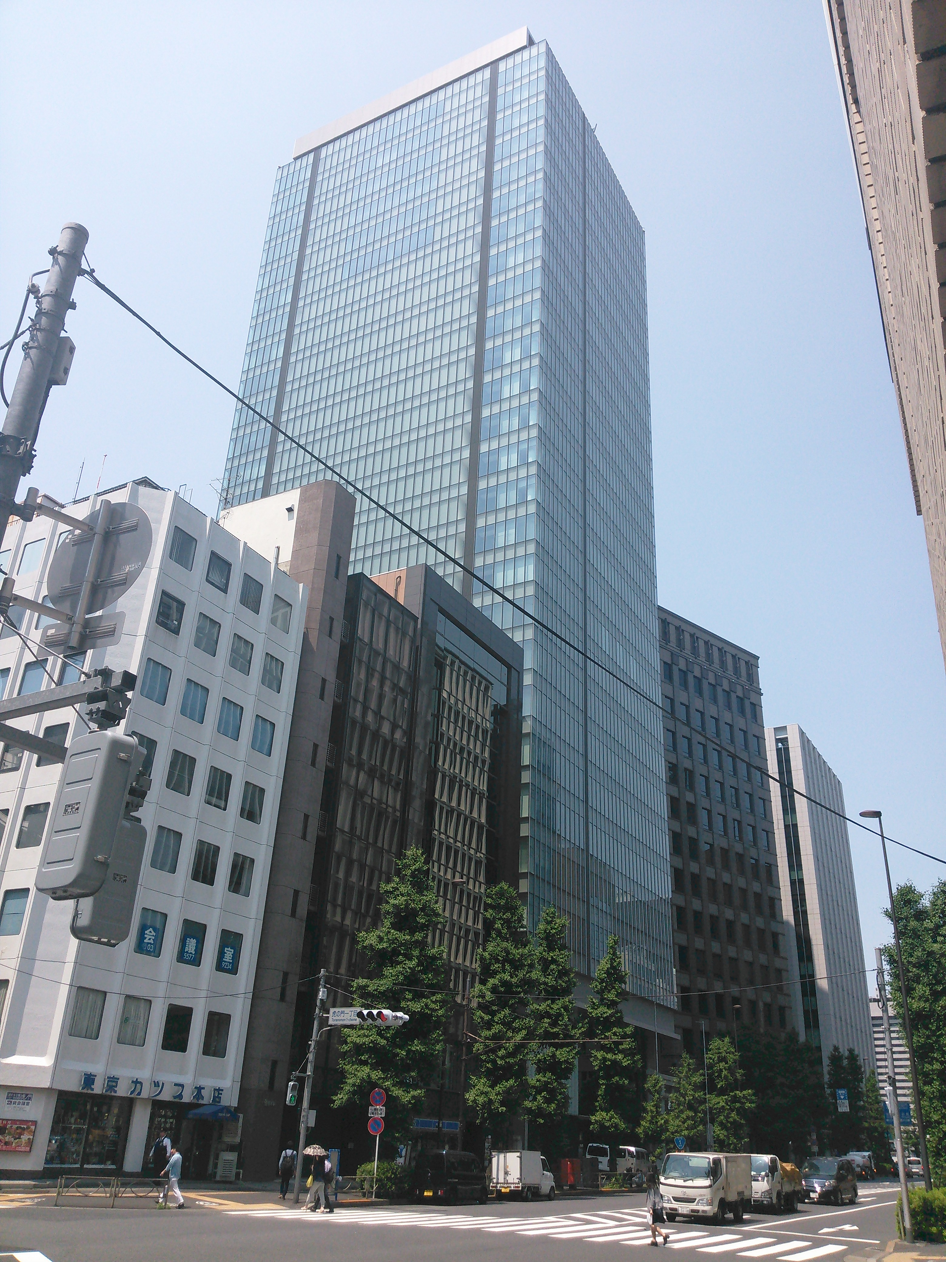 東京都港区、虎ノ門琴平タワー